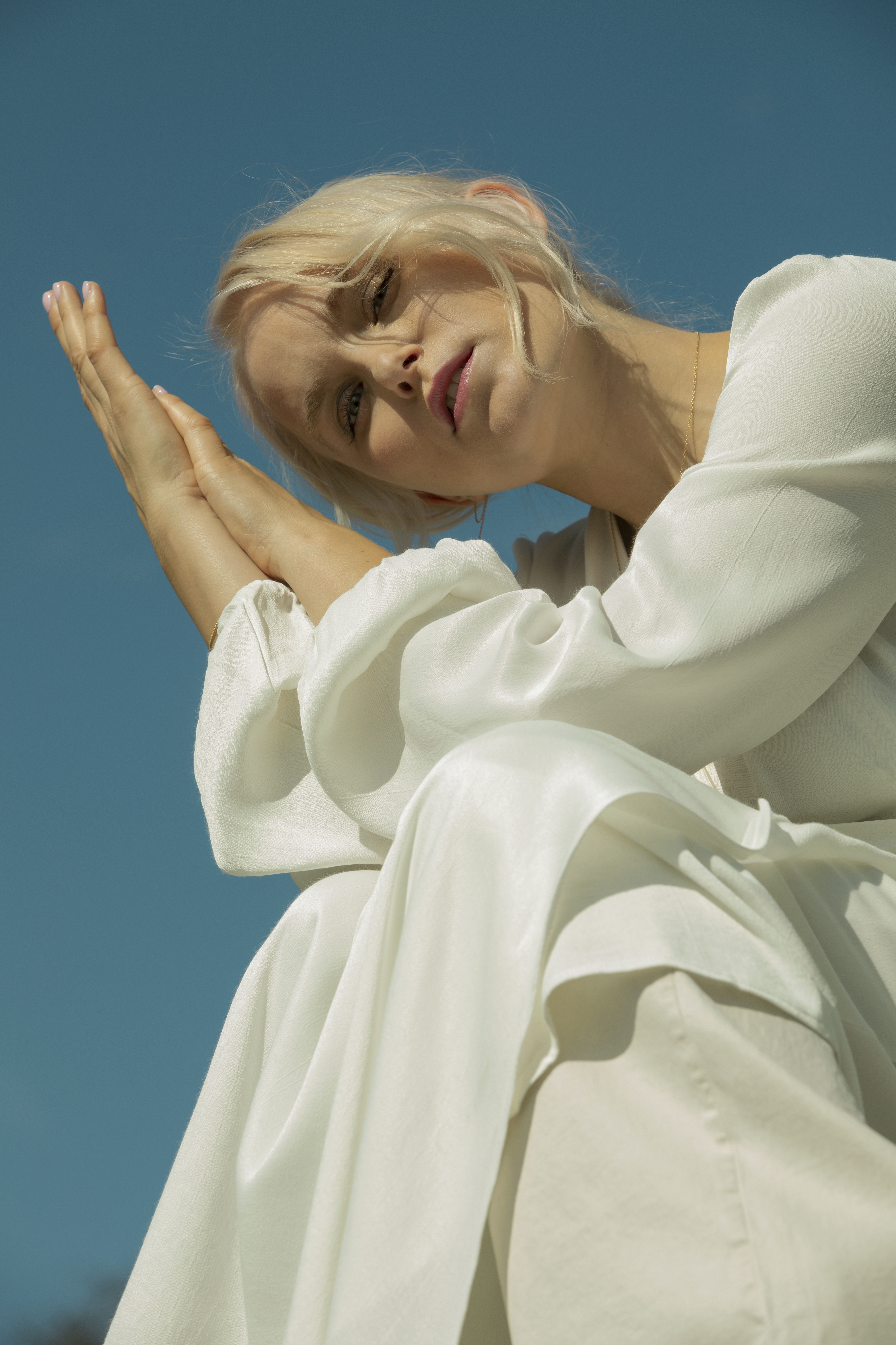 Eva Weel Skram 2019